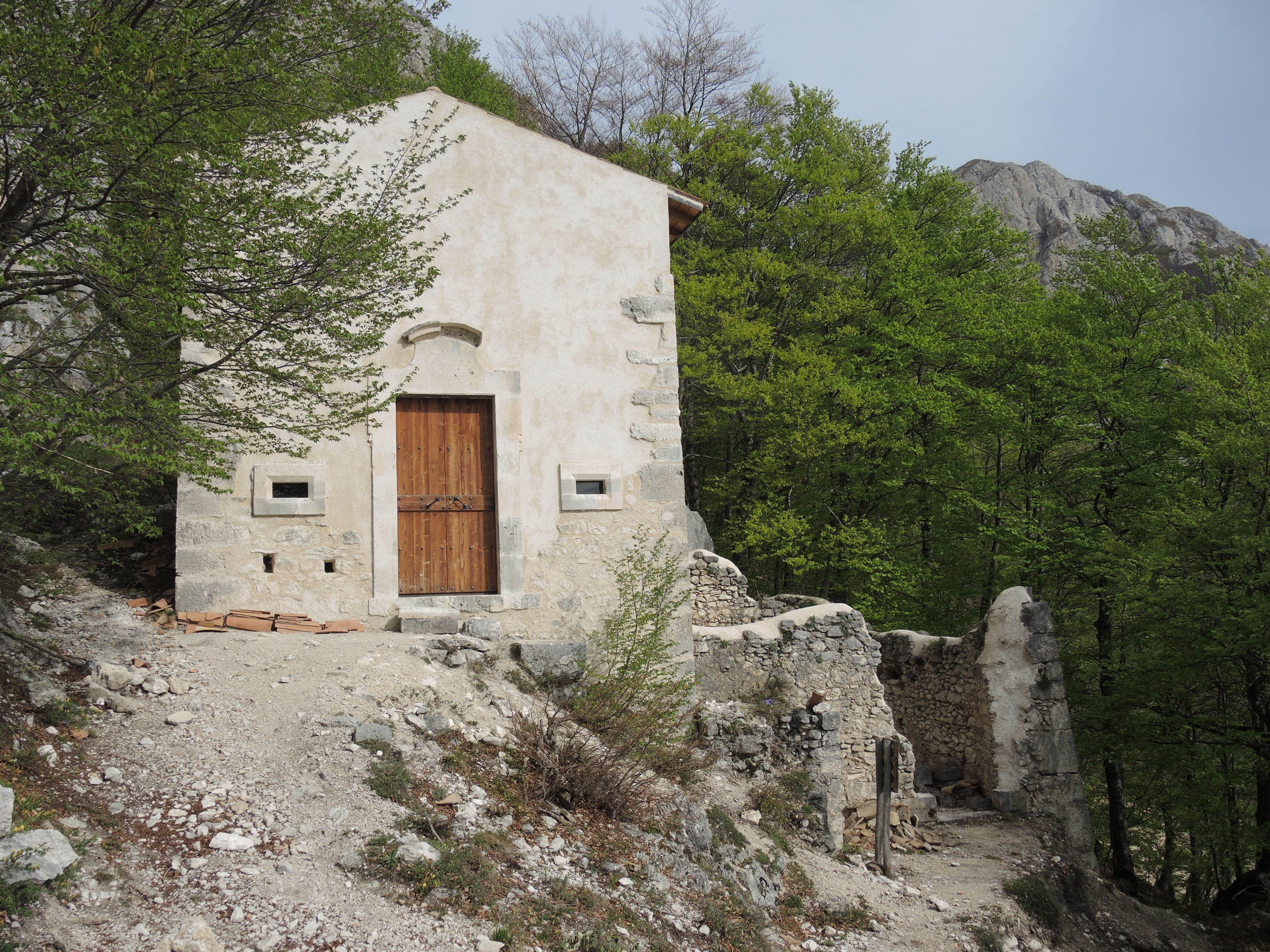 Campo di Giove: Eremo della Madonna di Coccia